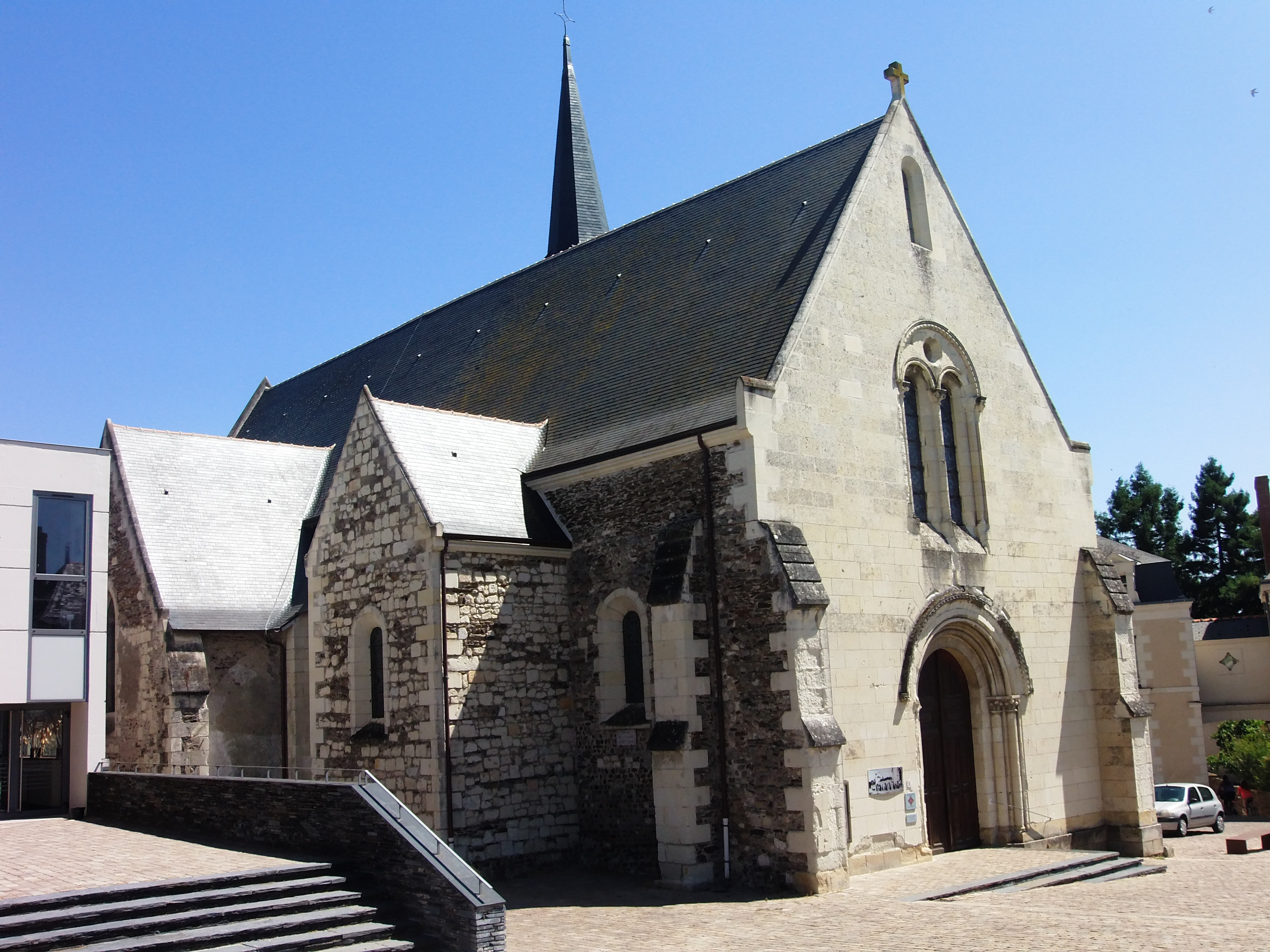 Église Saint-Symphorien à Bouchemaine (Maine-et-Loire, France), des XIe, XIIe, XIIIe, XVe et XIXe siècles, inscrite au titre des monuments historiques en 1972 (PA00108980). Vue d’ensemble. Juillet 2015.